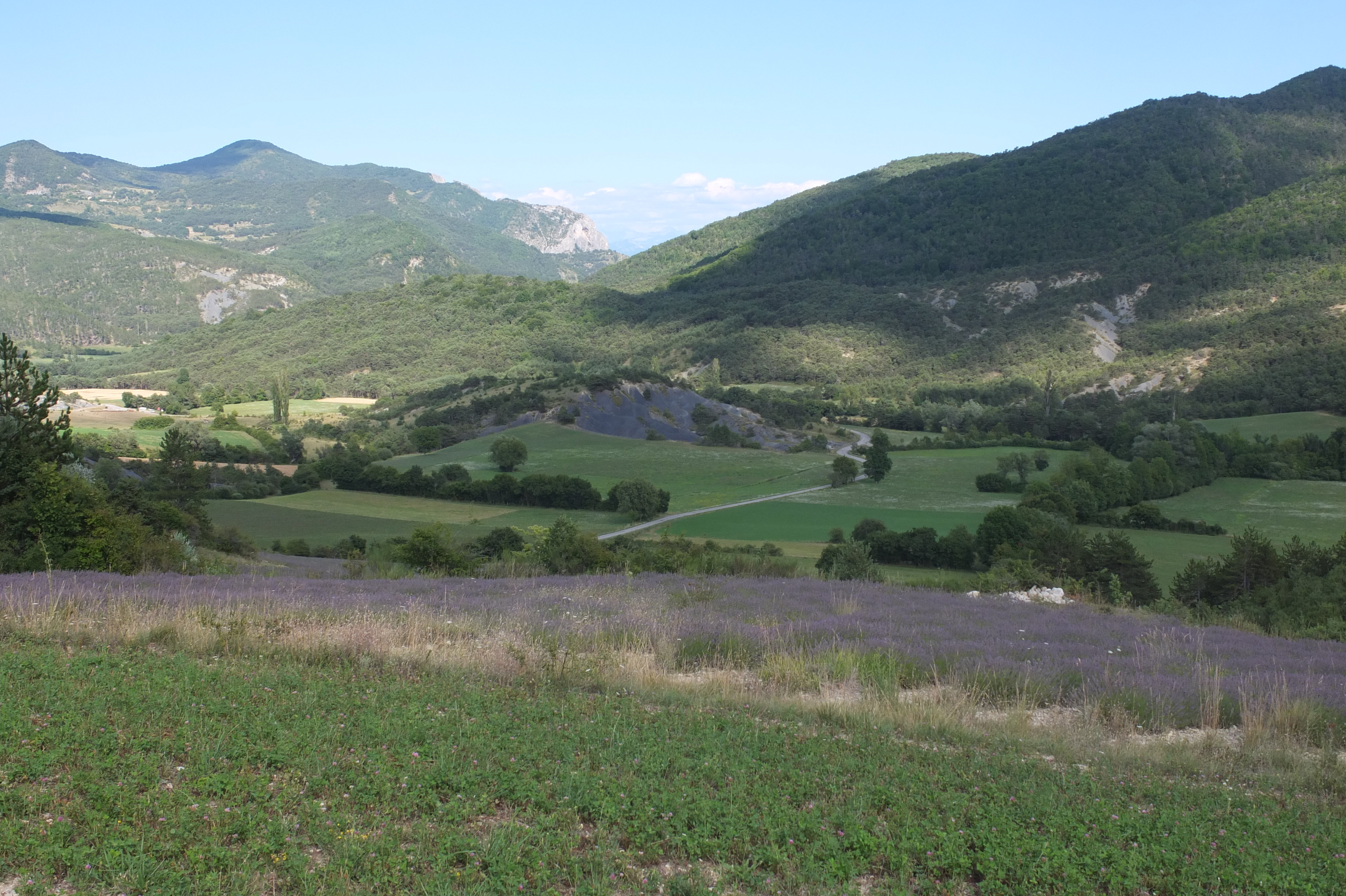 Étoile-Saint-Cyrice - Vue de la vallée